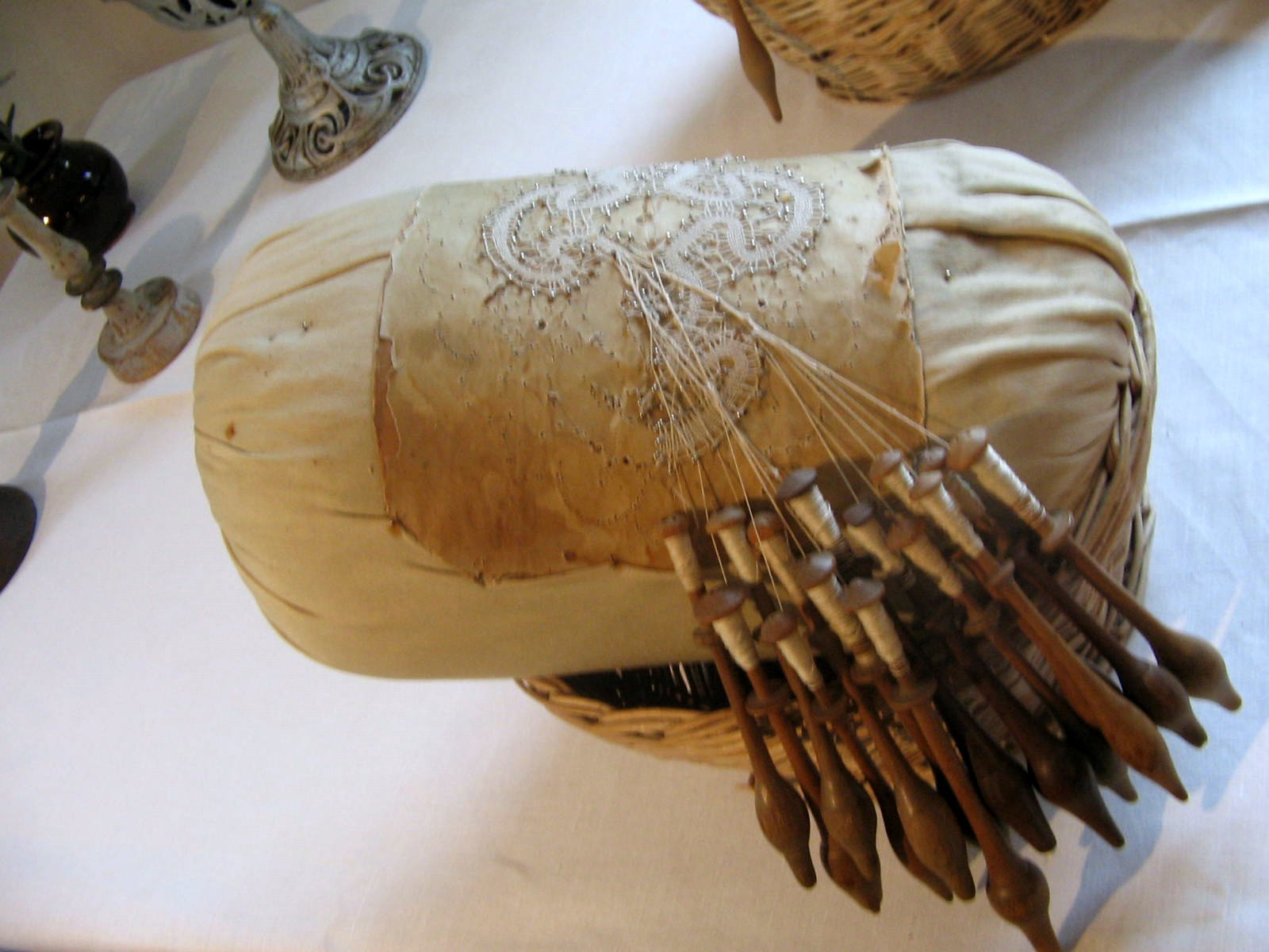 Museum Železniki, Slovenia